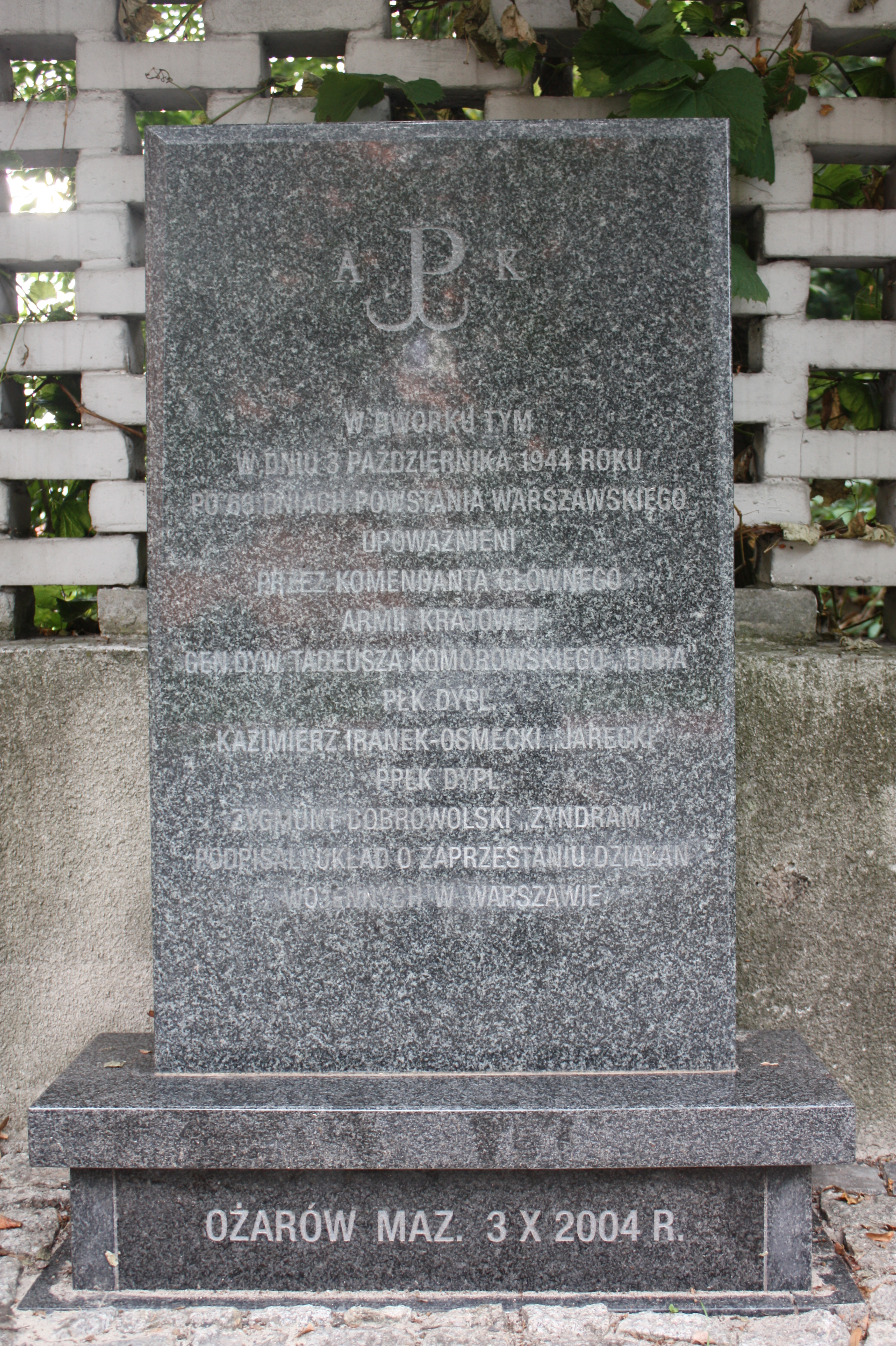 Tablica upamiętniająca akt podpisania kapitulacji w Dworku Reicherów w Ożarowie Mazowieckim